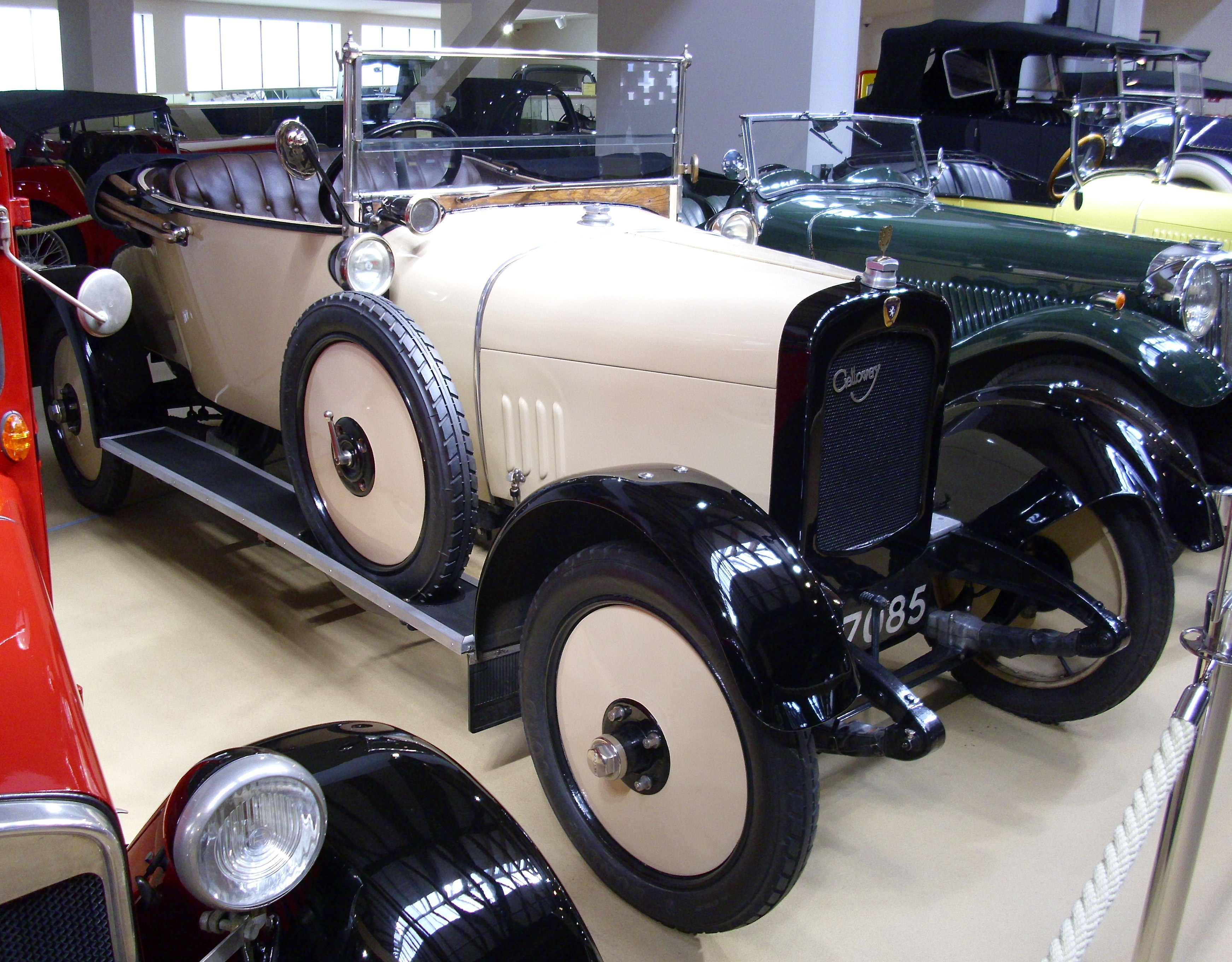 Galloway 10/20 HP 1923 im Seppenbauer Automuseum